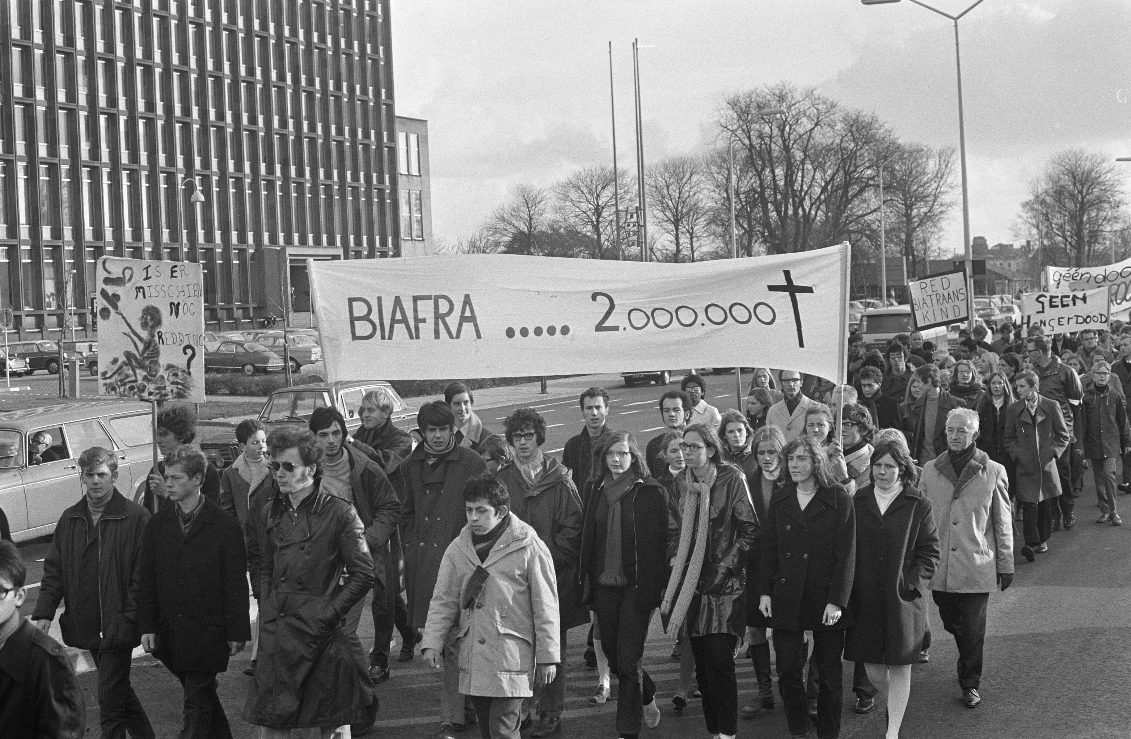 Collectie / Archief : Fotocollectie Anefo Reportage / Serie : [ onbekend ] Beschrijving : Ongeveer 10.000 kinderen van scholen uit het gehele land demonstreerden in Den Haag om de regering te herinneren aan de hongersnood in Biafra. Demonstranten met borden Datum : 20 november 1969 Locatie : Biafra, Den Haag Trefwoorden : demonstraties, kinderen Fotograaf : Mieremet, Rob / Anefo Auteursrechthebbende : Nationaal Archief Materiaalsoort : Negatief (zwart/wit) Nummer archiefinventaris : bekijk toegang 2.24.01.05 Bestanddeelnummer : 922-9928